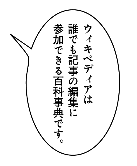 アンチゴチ（ゴシック体とアンチック体の混植）の例